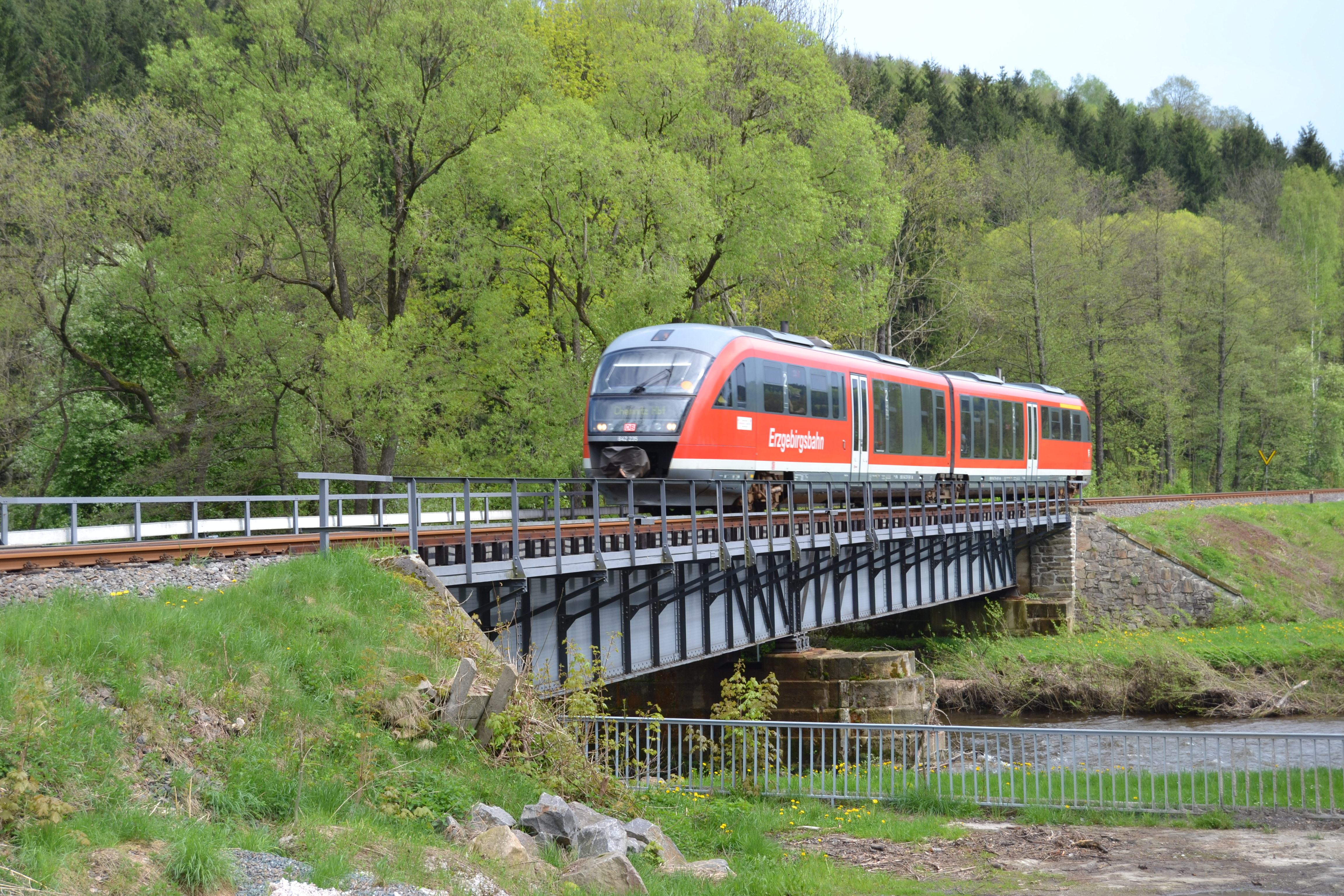 Triebwagen BR 642 der Erzgebirgsbahn auf Flöhabrücke in der Ortslage Pockau kurz hinter dem Bf Pockau-Lengefeld